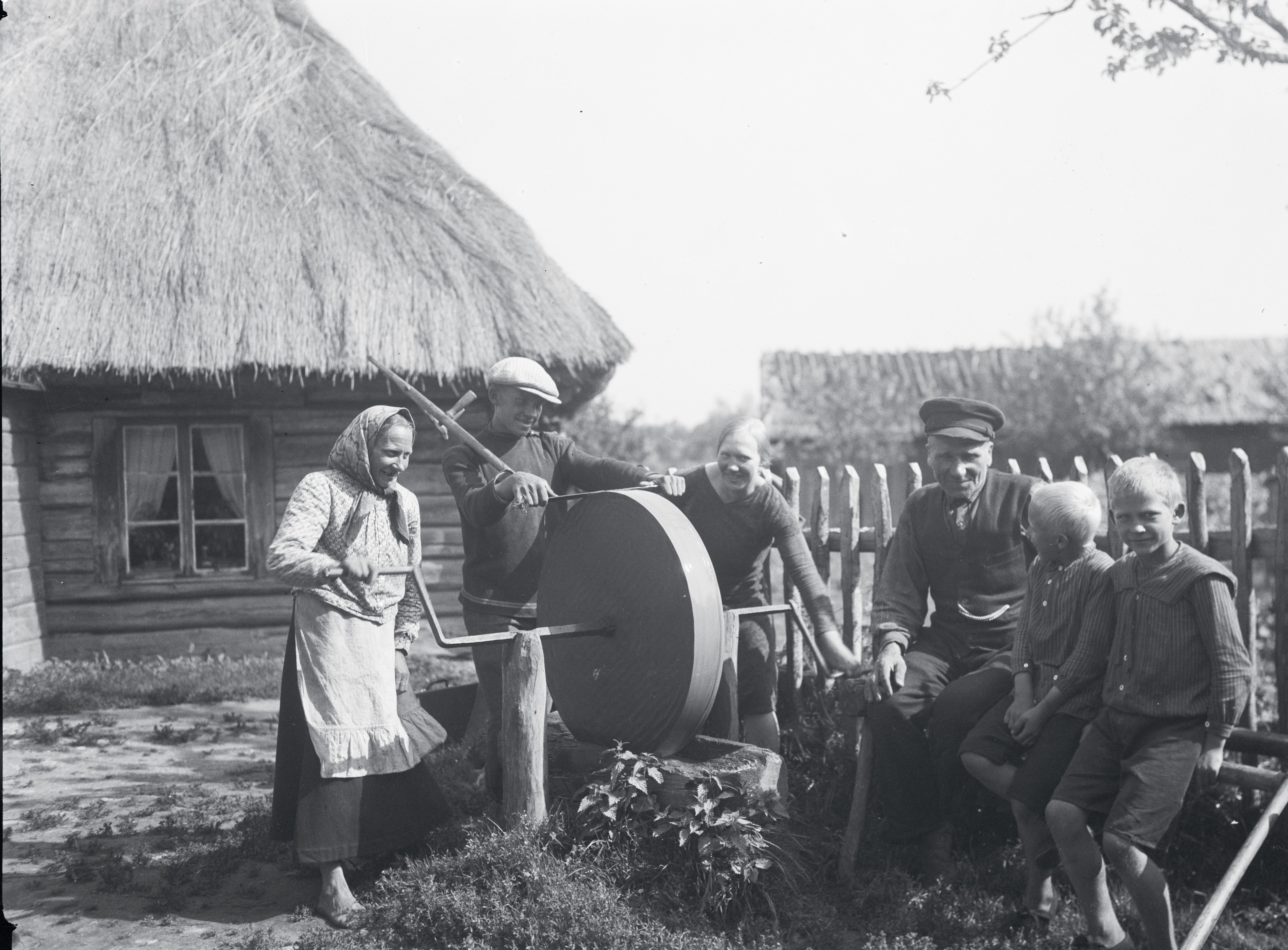 Vikatikäiamine heinamaale minekul, Martna khk